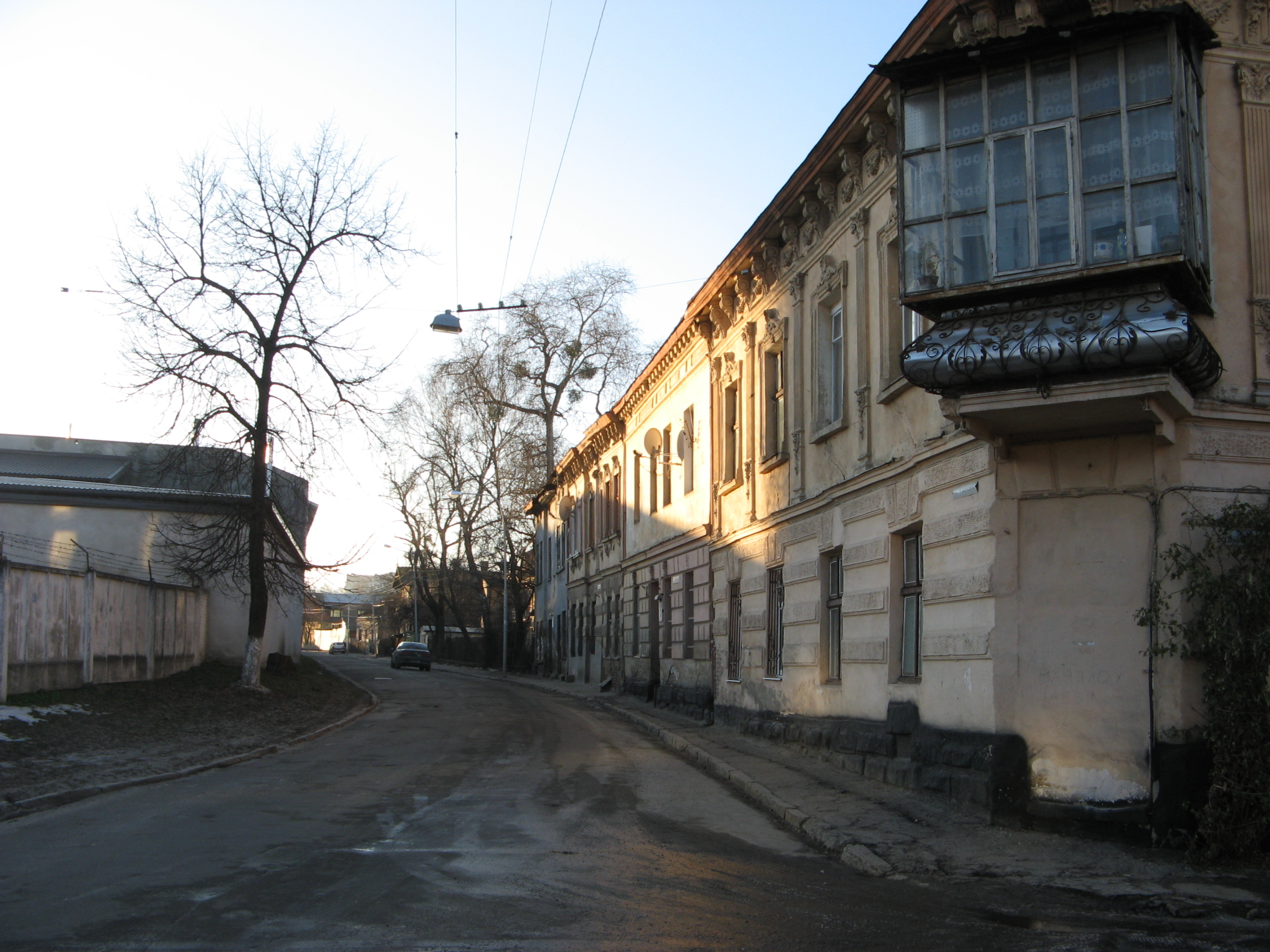 Дашкевича_вул._(Львів): Дашкевича_вул._(Львів)